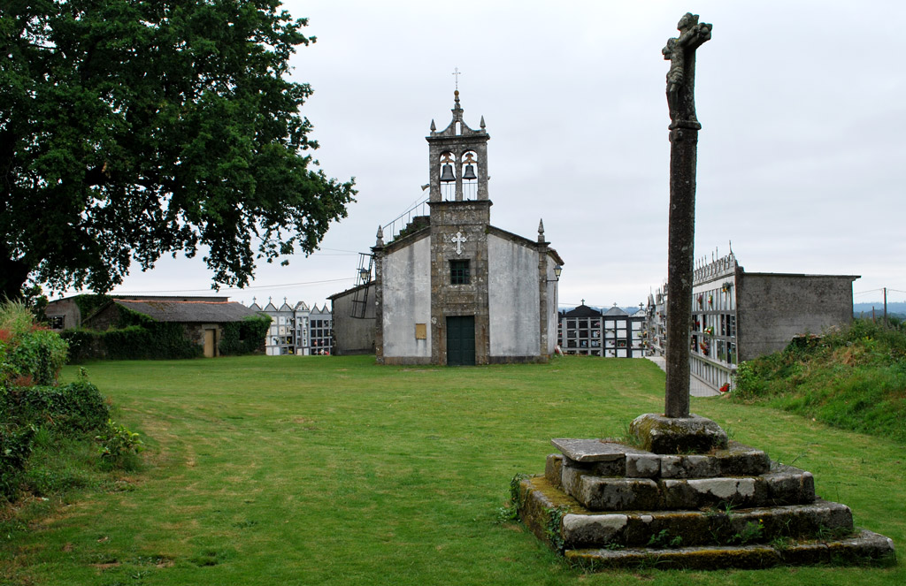 Vista da igrexa de Parada en Ordes, A Coruña